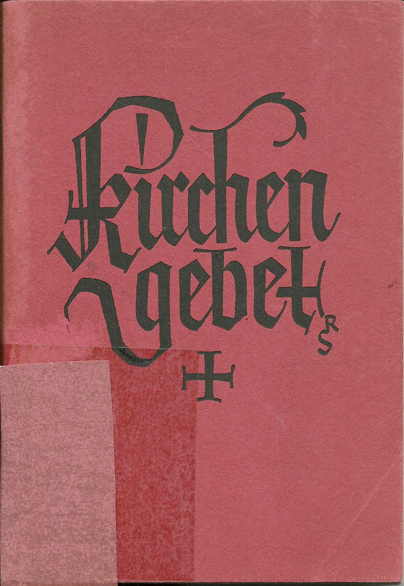 Kirchengebet für den Gemeinschaftsgottesdienst katholischer Jugend, Jugendführungsverlag Düsseldorf 1930, Titelseite